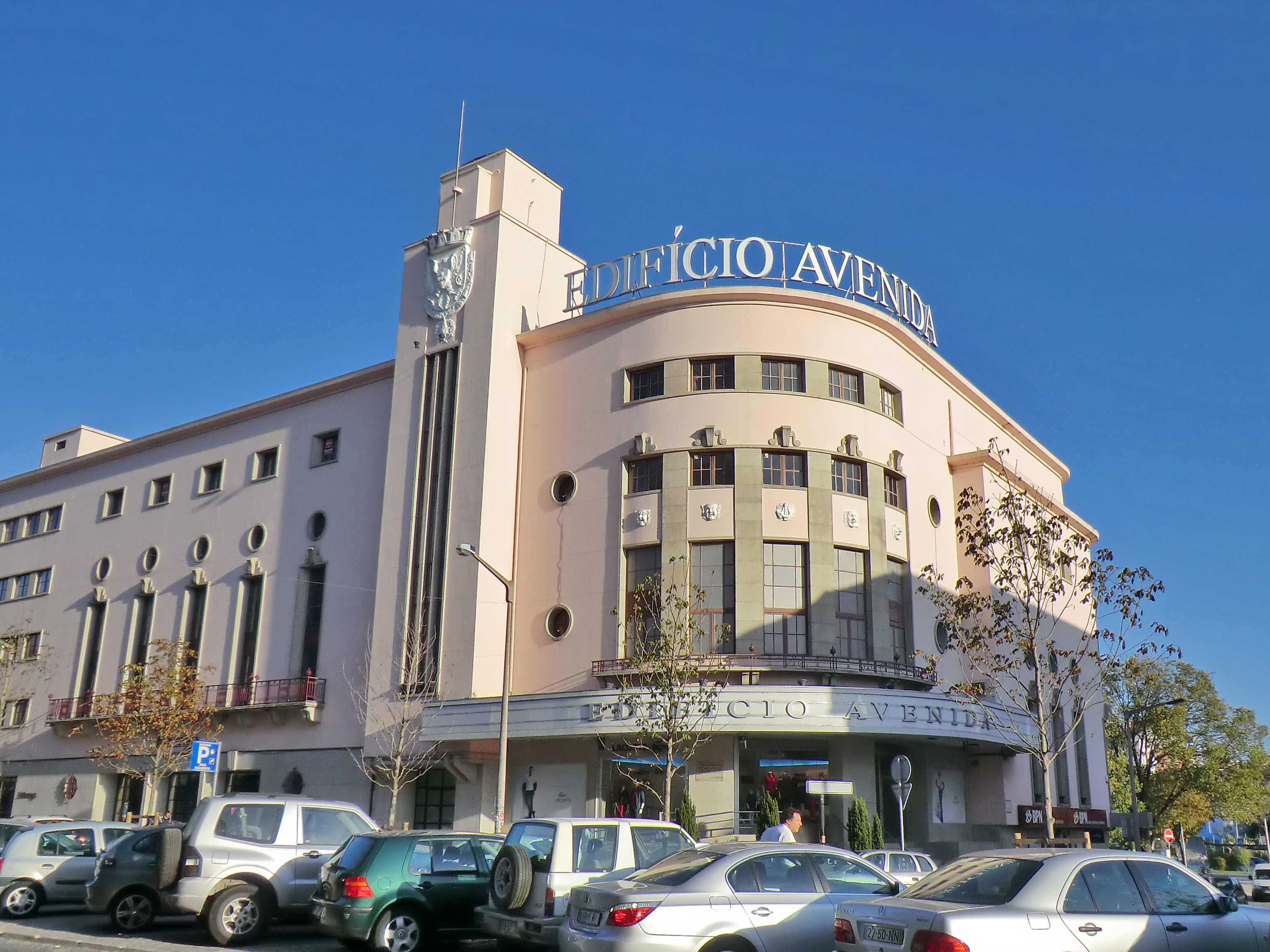 Cine-Teatro Avenida / Edifício Avenida This file was uploaded for Wiki Loves Monuments in Portugal with the unique identifier 97010577.